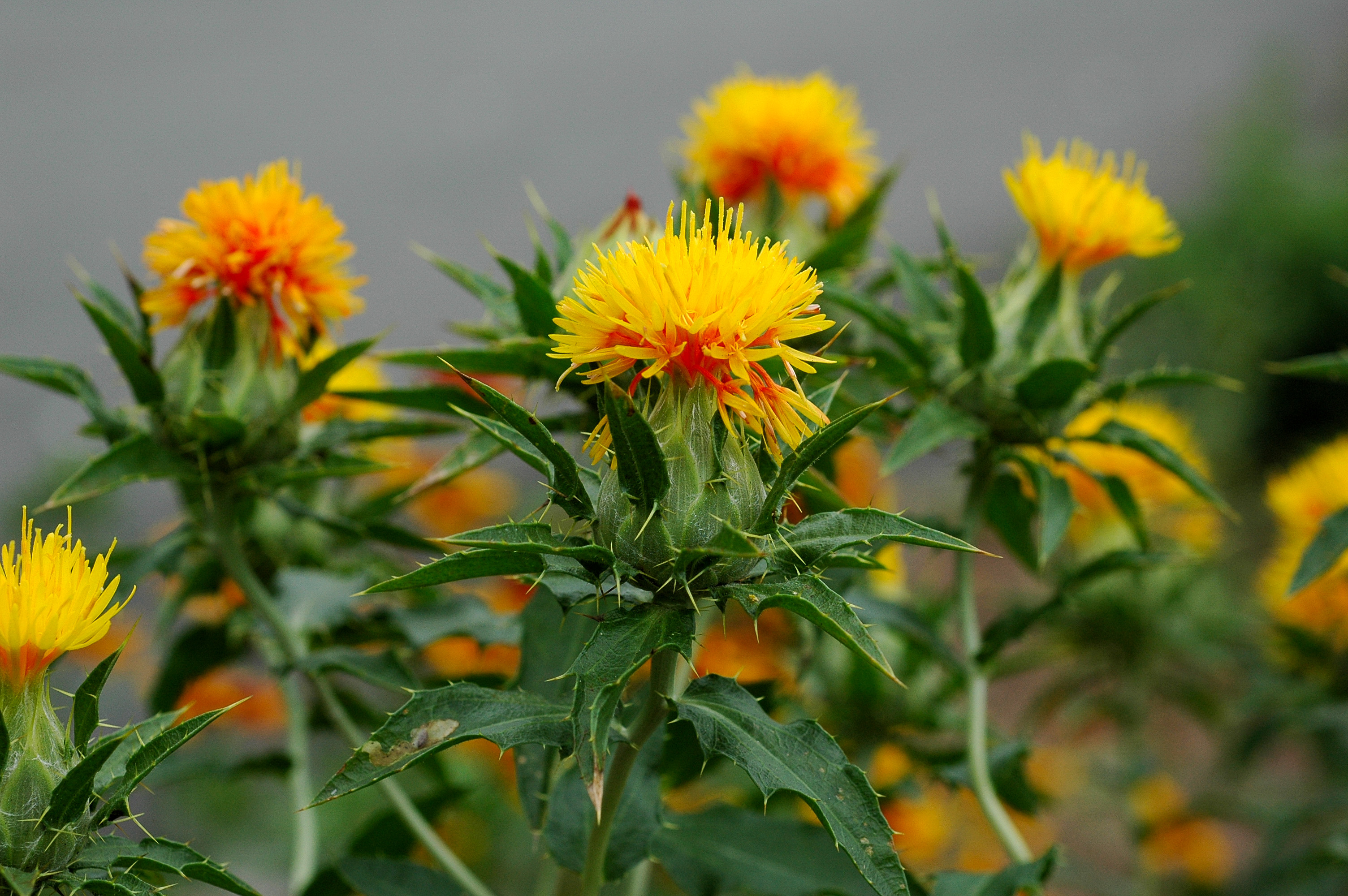 ベニバナ Carthamus tinctorius L.